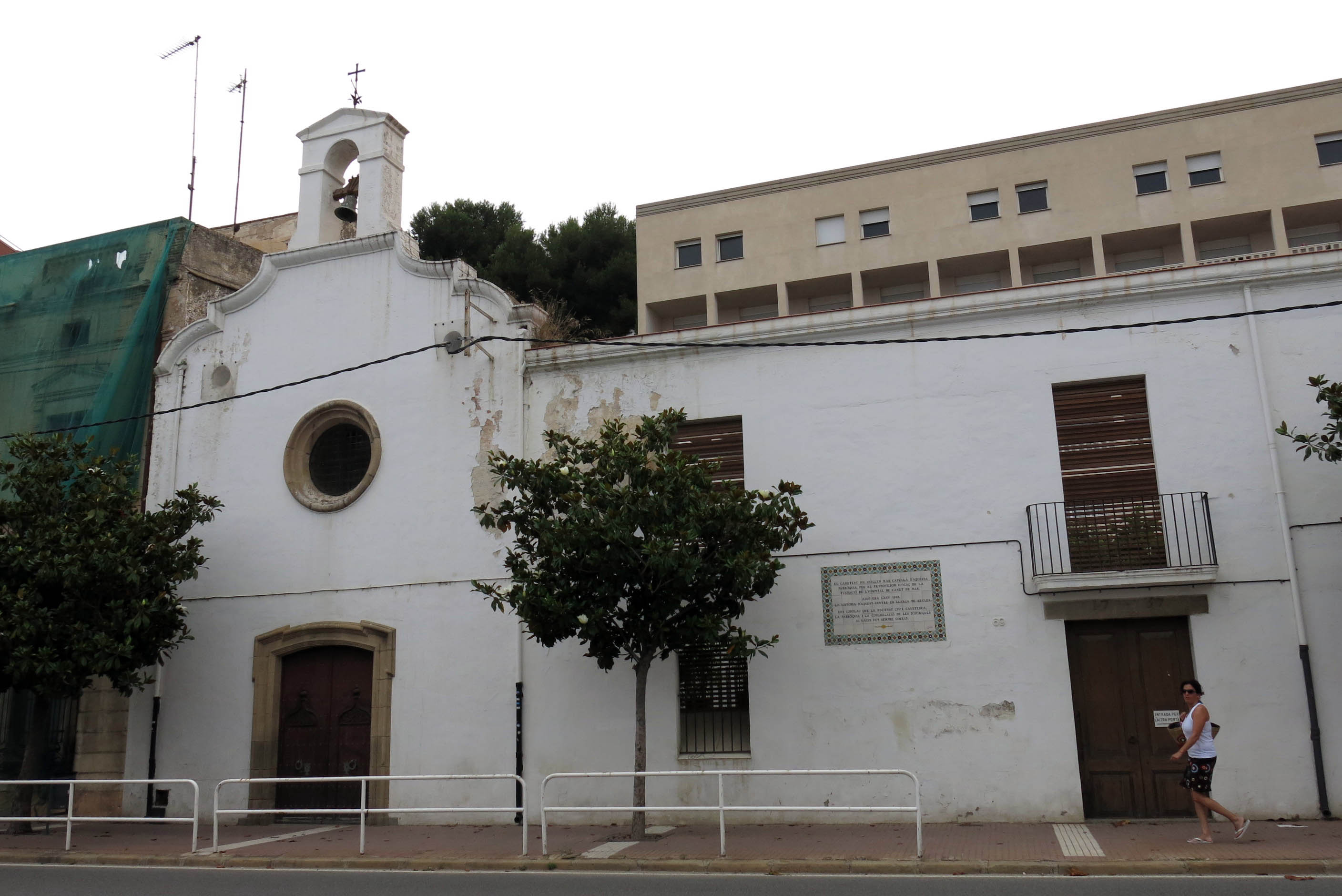 Església Hospital (Canet de Mar)